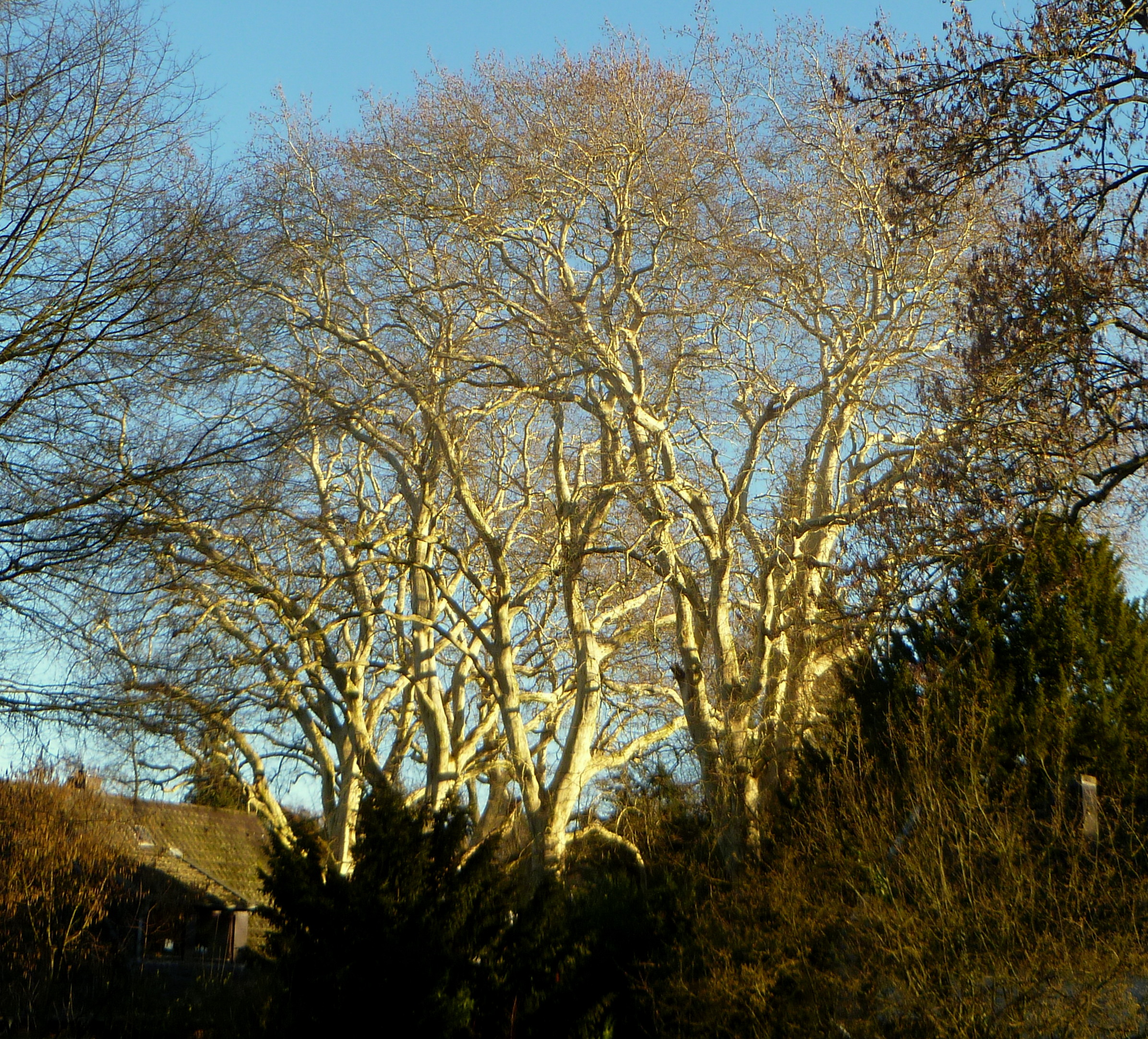 Acht Platanen am Gut Diepenbenden; Naturdenkmal